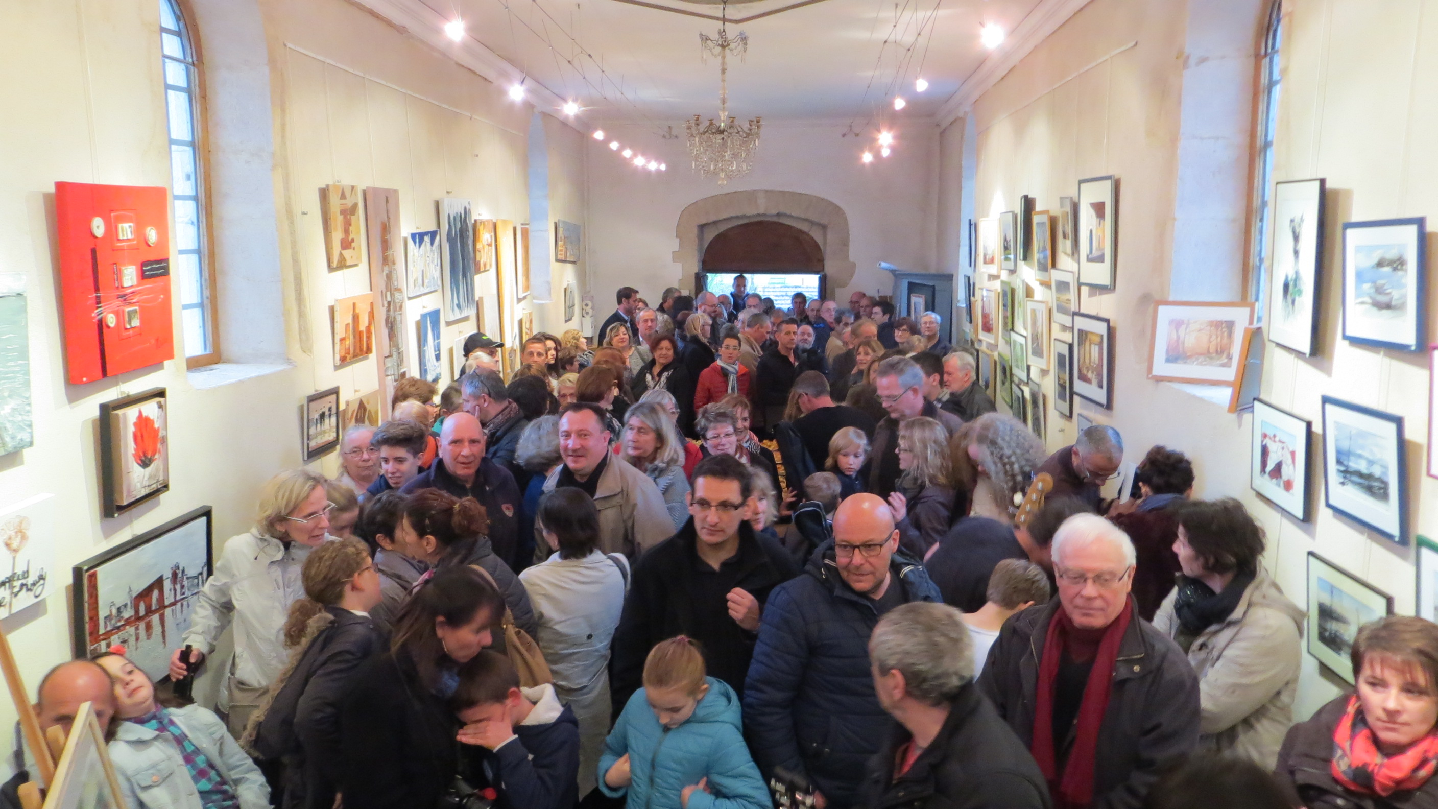 Lancement saison artistique 2016 à la Chapelle de Ranchot